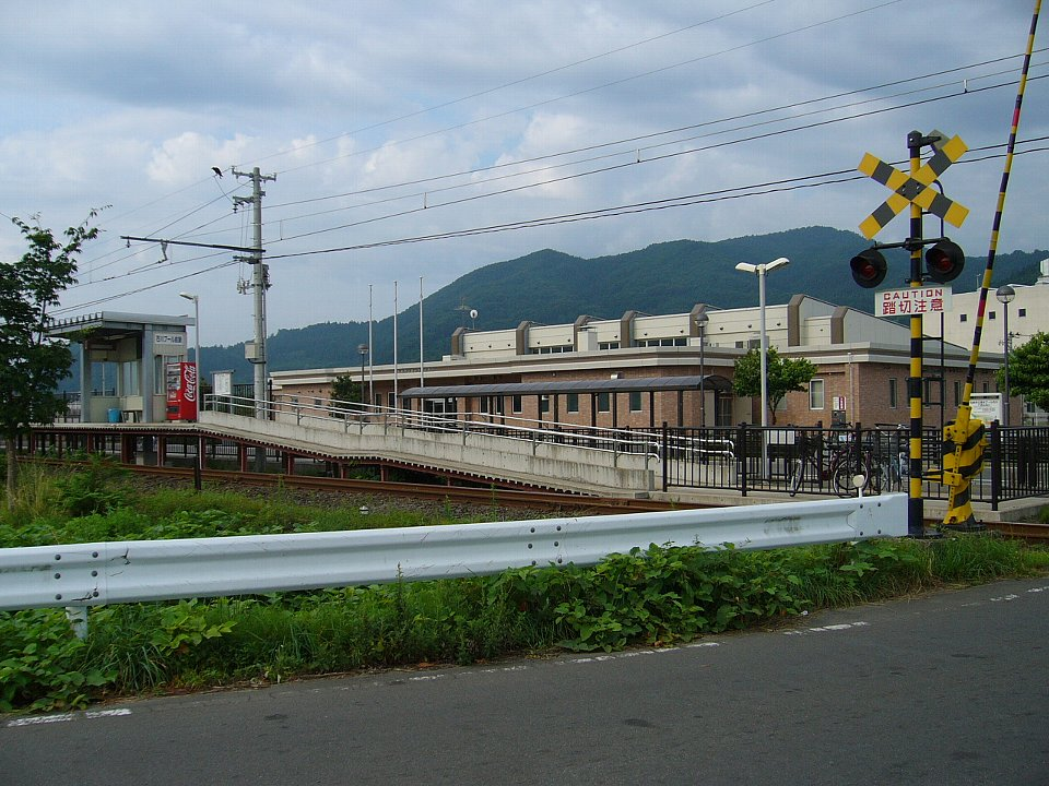 弘南鉄道大鰐線 石川プール前駅